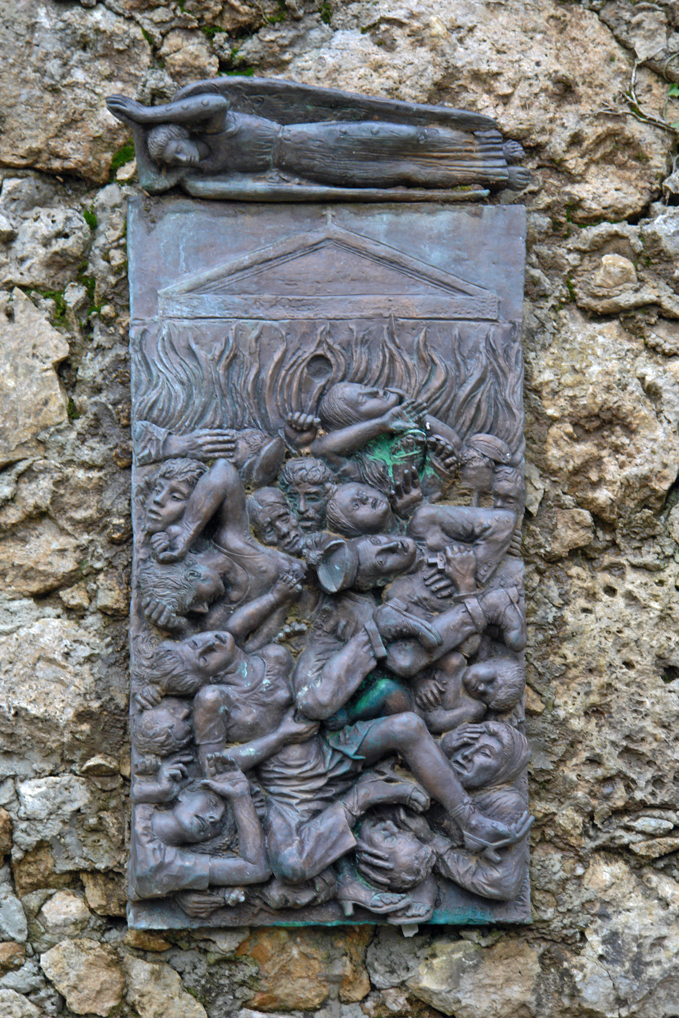 Sant' Anna di Stazzema, Tafel am Kreuzweg zum Mahnmal